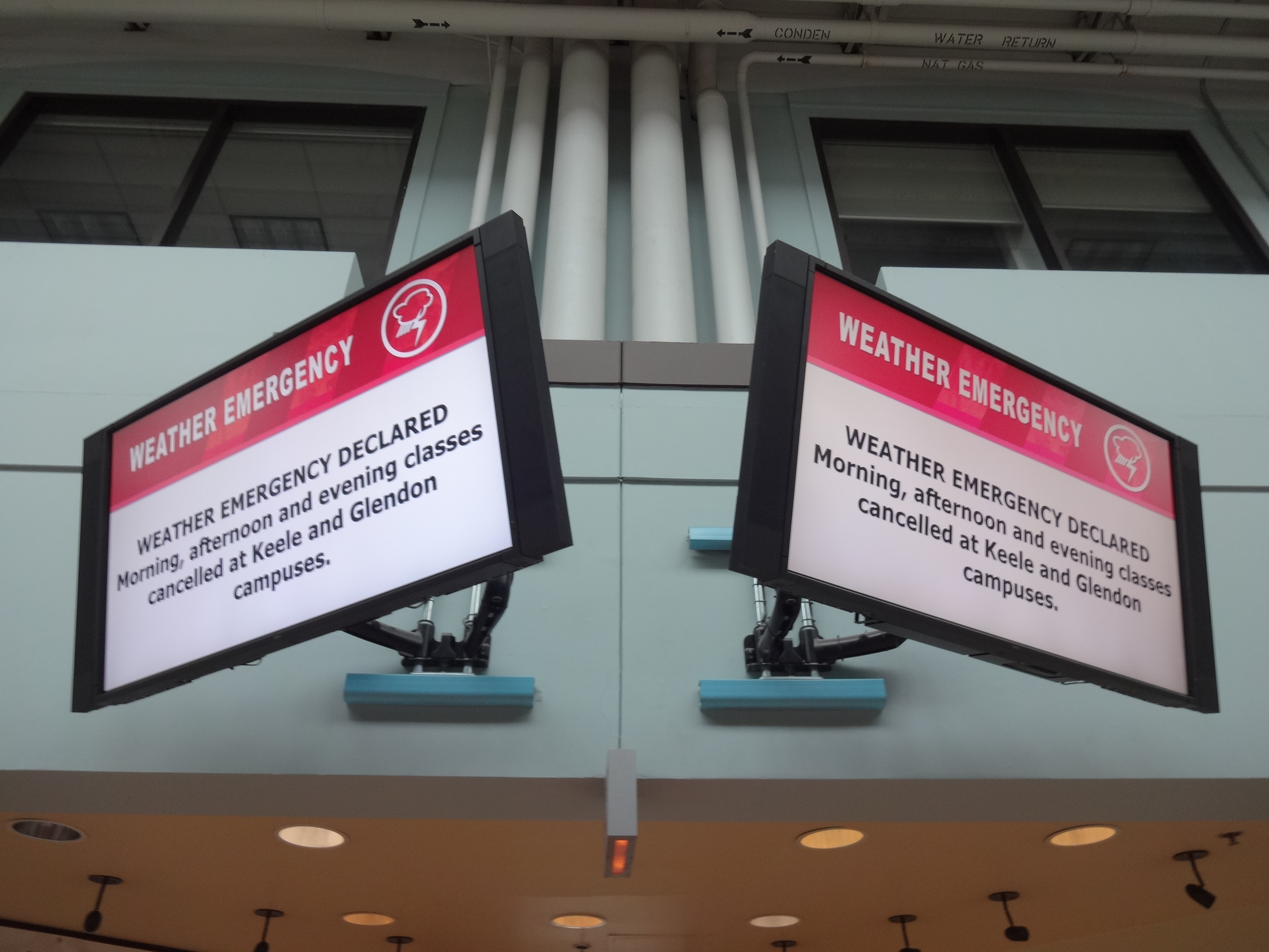 Televisão a noticiar a Tempestade do Cabo Hatteras dentro da York University.